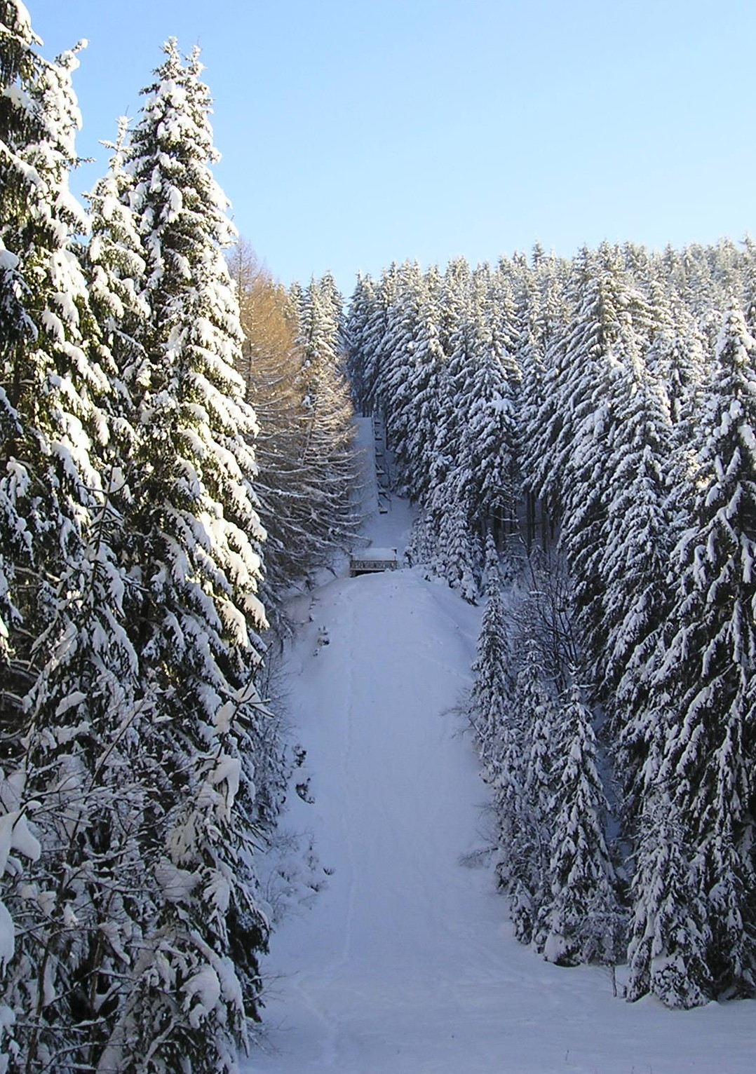 Riesengrundschanze in Hirschsprung, Deutschland